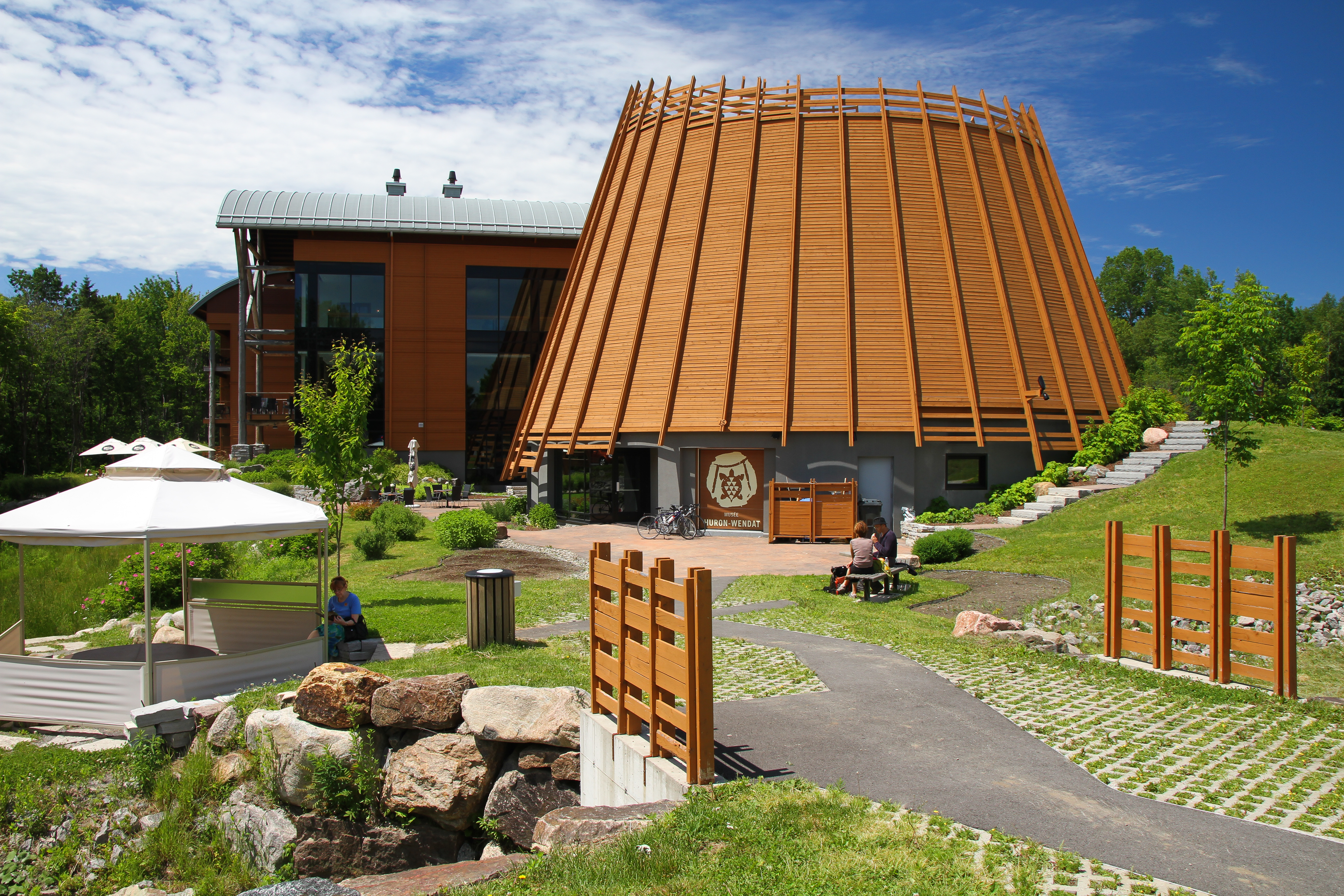 L'Hôtel-musée des Premières nations dans le village huron de Wendake, près de Québec